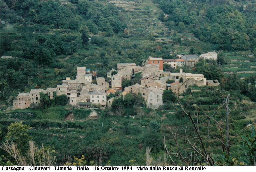 Cassagna - Chiavari - Italia - 1994 - Vista da Rocca Roncallo